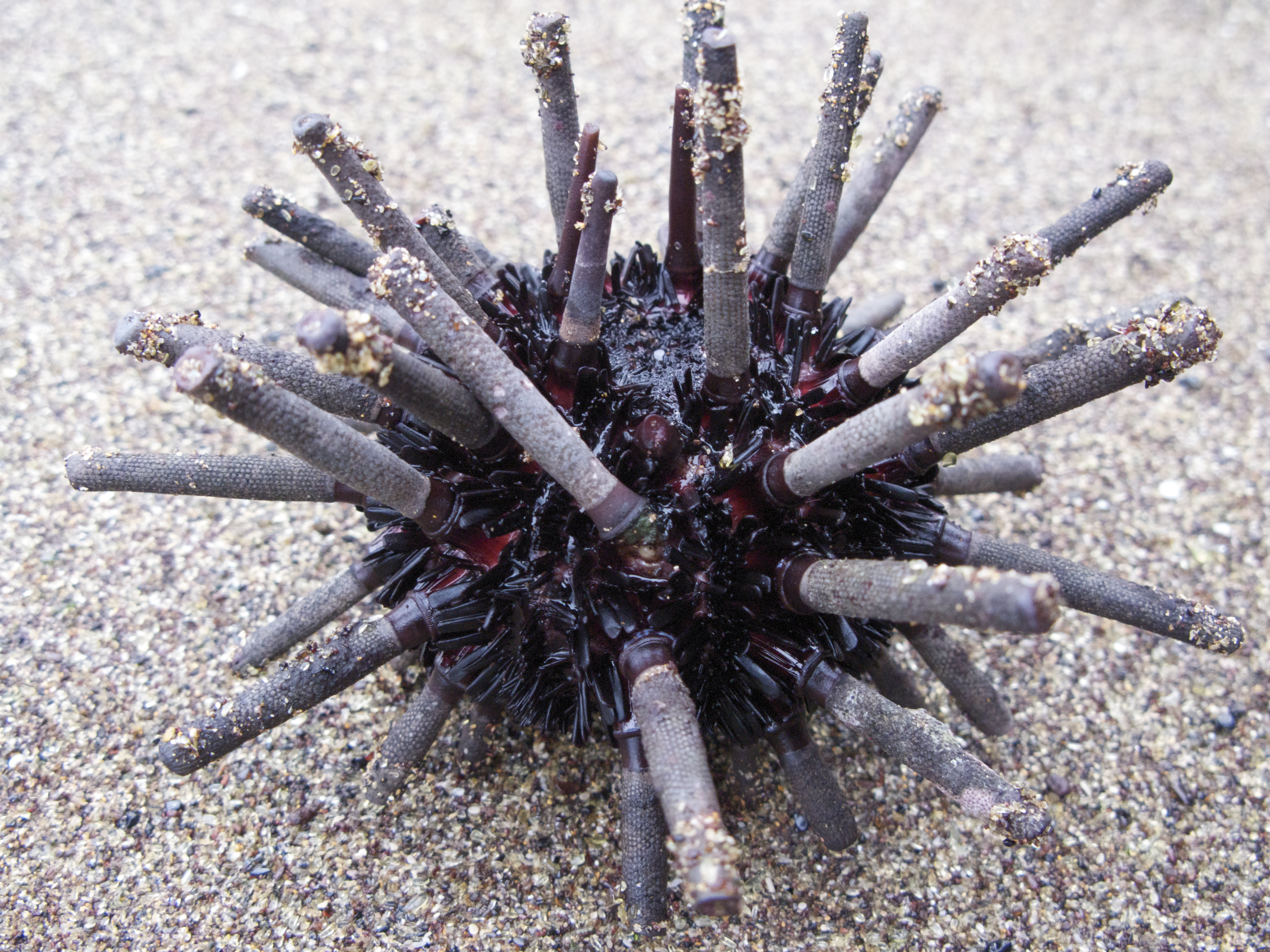 Oursin-lance des Galapagos (Eucidaris galapagensis) aux Galapagos.